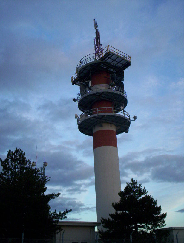 Émetteur de télévision installé sur la colline de Bourg-Saint-Andéol, Ardèche (07). Puissance d'émission : 280 W